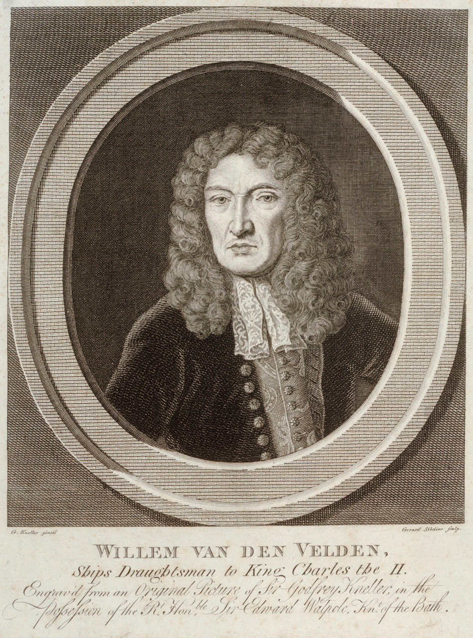 Willem van de Velde the Elder (1611-1693)